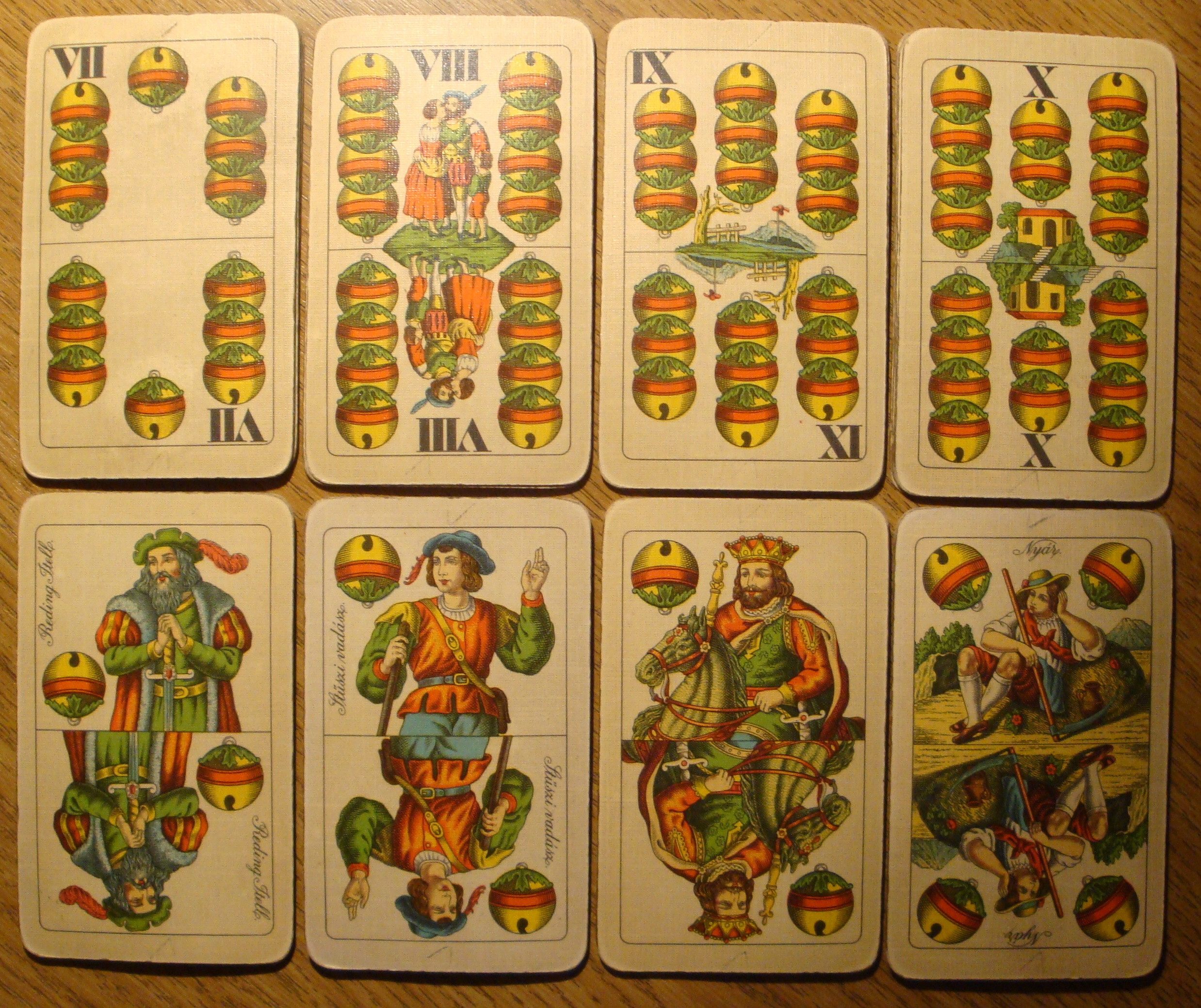 Sedmica - igra s kartami